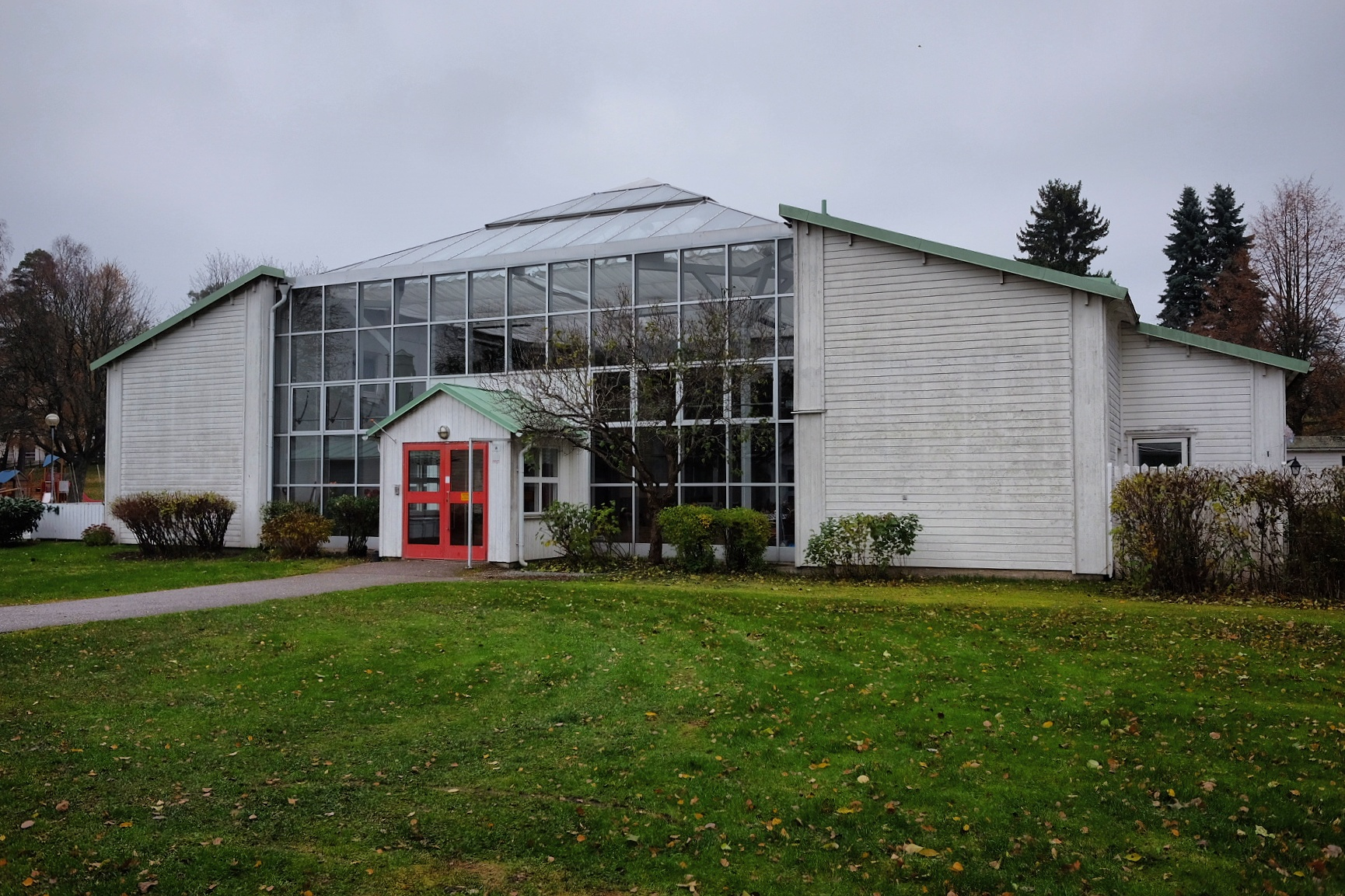 Hus, Maria Krantzons väg, Upplands Väsby.